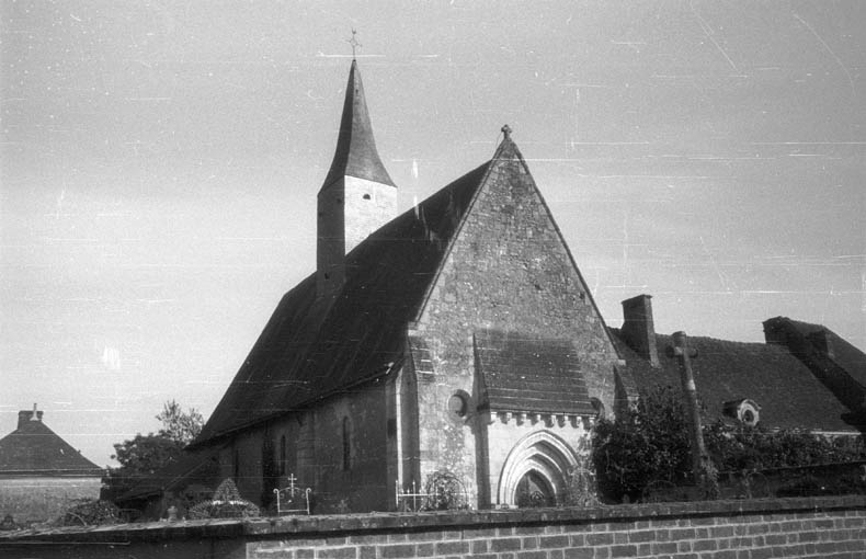 Saint-Jacques-des-Guérets Motiv: Saint-Jacques-des-Guérets Kategori: (01) ExteriörerSaint-Jacques-des-Guérets.